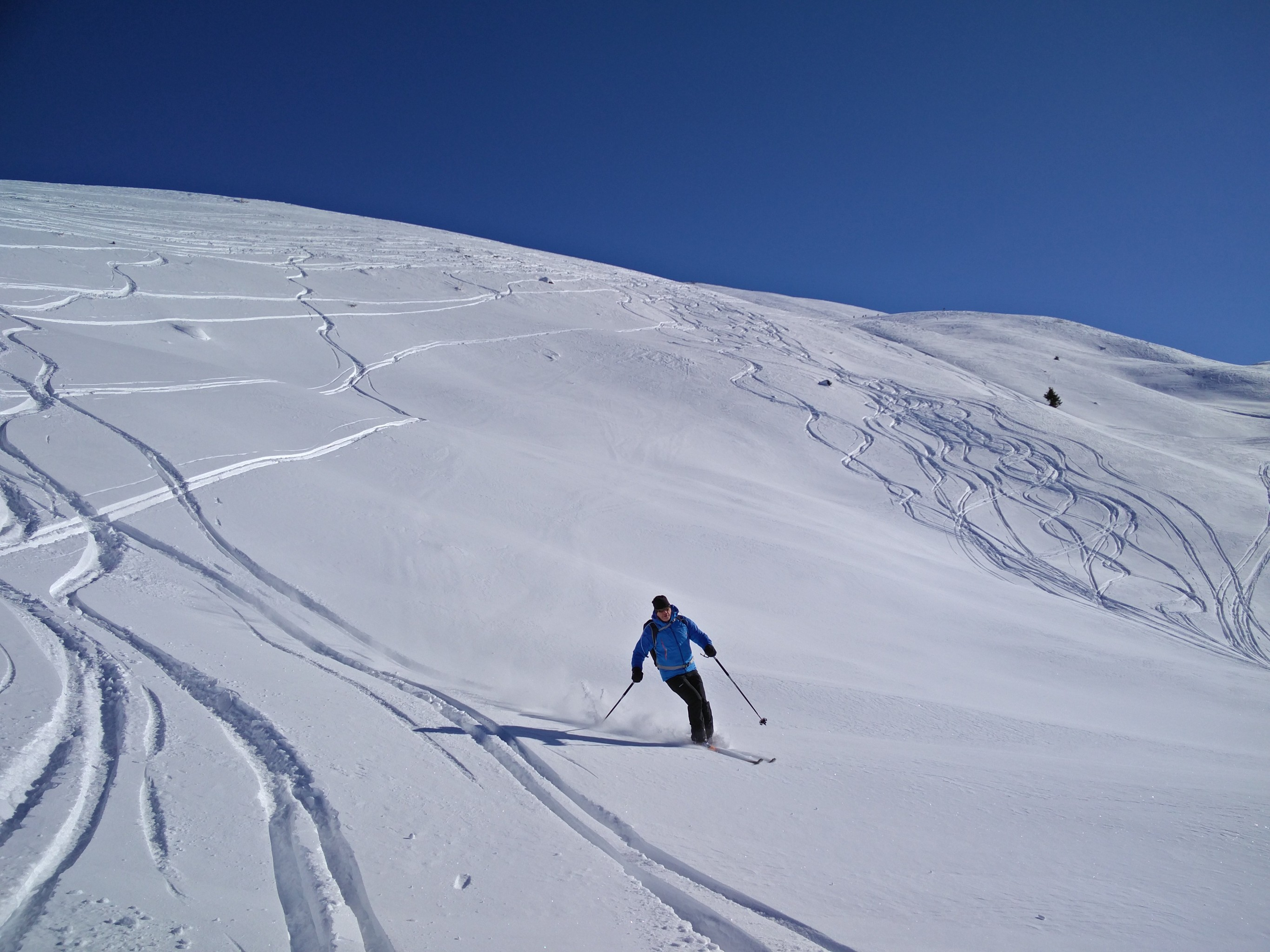 Discesa da Pointe de la Pierre